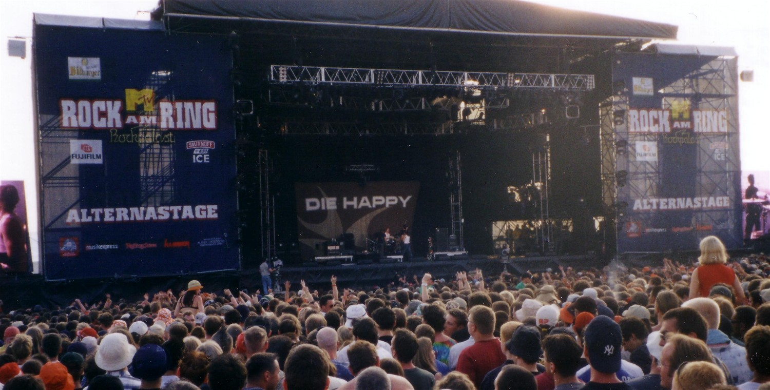 Die Happy auf der Alternastage von Rock am Ring 2003 aufgenommen am: 6. Juni 2003